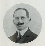 Portrait photographique anonyme